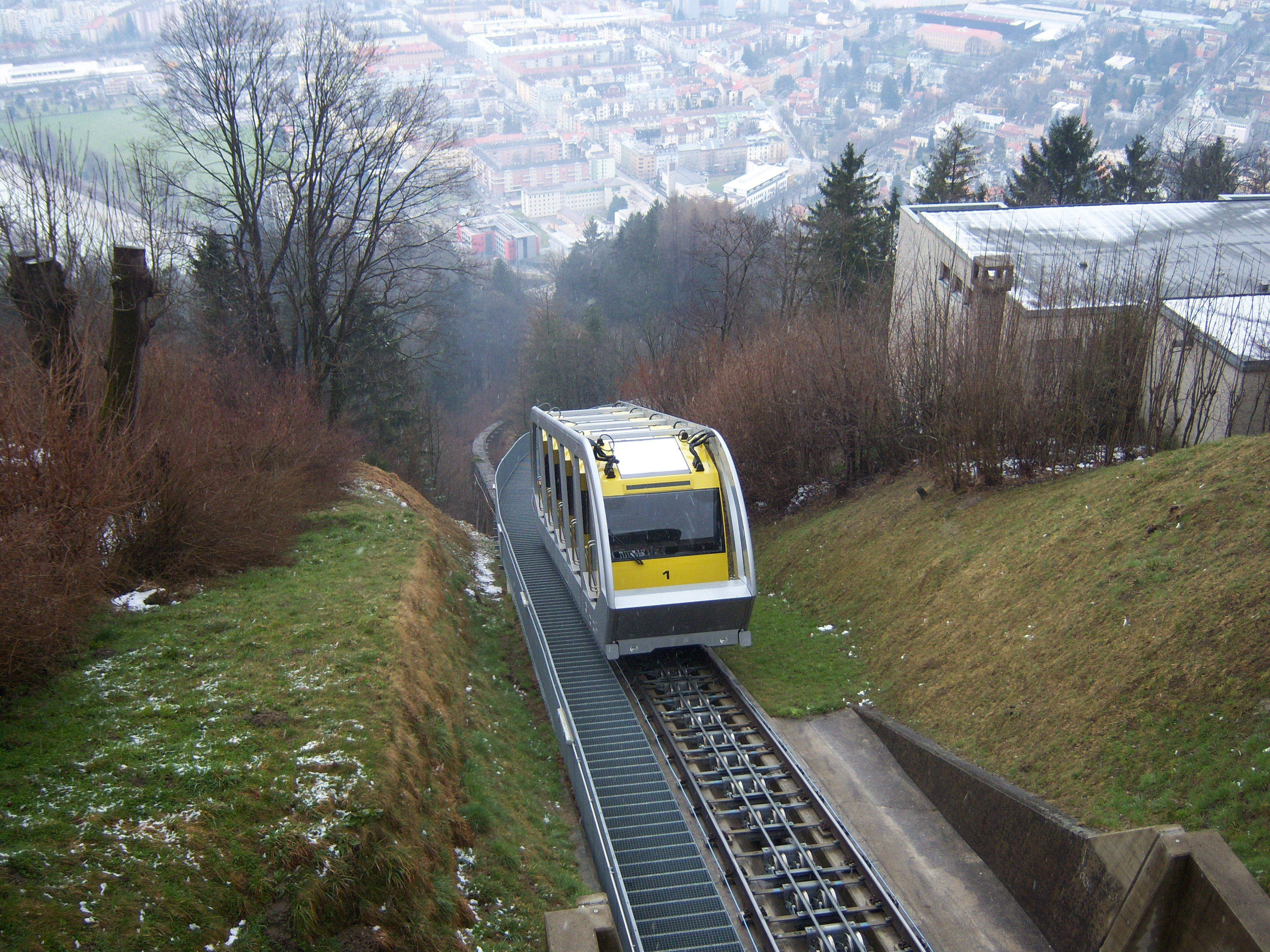 Die Innsbrucker Hungerburgbahn kurz vor erreichen der Bergstation